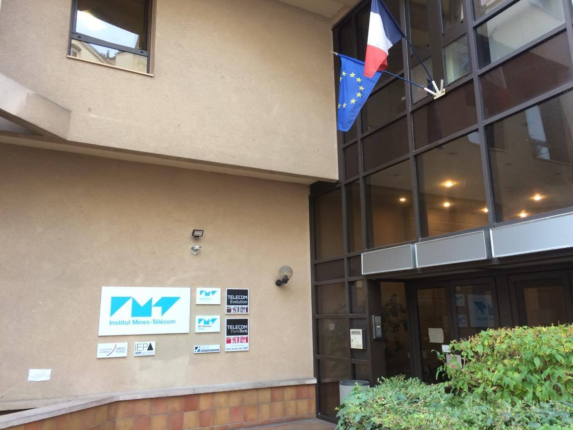 Entrée IMT.